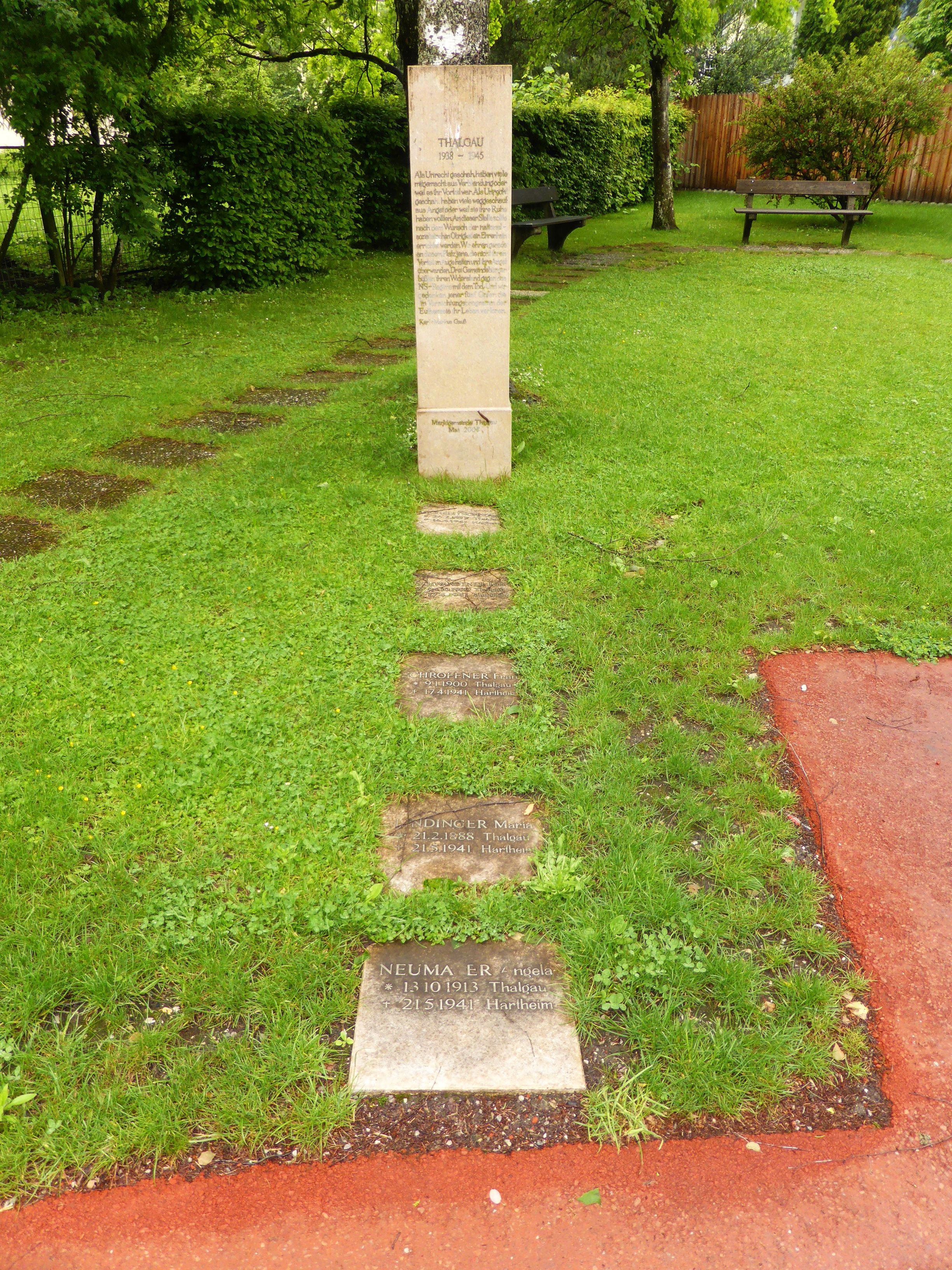 Bezirksgericht (ehem. Pfleggericht), Thalgau Thalgau 1938-1945 Als Unrecht geschah, haben viele mitgemacht aus Verblendung oder weil es ihr Vorteil war. Als Unrecht geschah, haben viele weggeschaut aus Angst oder weil sie ihre Ruhe haben wollten. An dieser Stelle sollte nach dem Wunsch der nationalsozialistischen Obrigkeit ein Ehrenhain errichtet werden. Wir ehren gerade an diesem Platz jene, die nicht ihren Vorteil im Auge hatten und ihre Angst überwanden. Drei Gemeindebürger büßten ihren Widerstand gegen das NS-Regime mit dem Tod. Und wir gedenken jener fünf Opfer, die in Vernichtungsprogramm der Euthanasie ihr Leben verloren. Karl-Markus Gauß Marktgemeinde ThalgauMai 2008 [1]